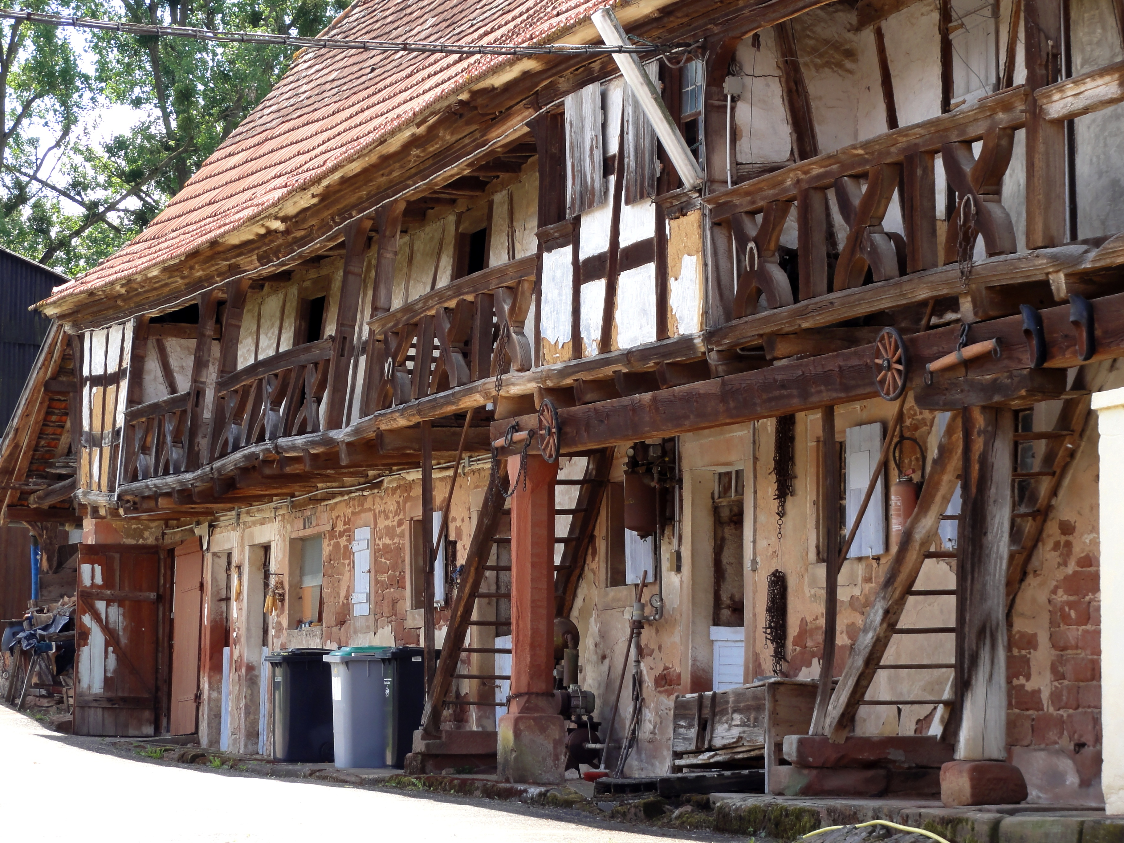 Alsace, Bas-Rhin, Geiswiller, Ferme (XVIIIe), 33 rue Principale